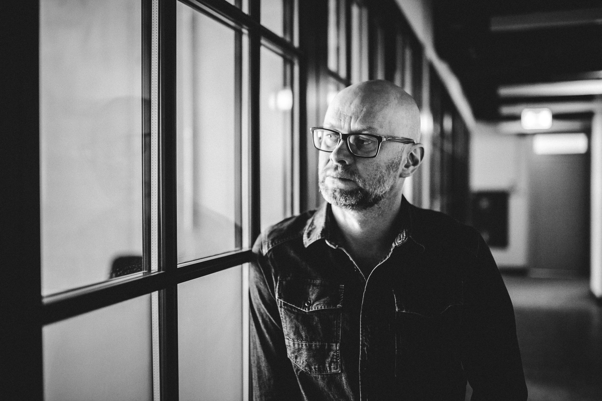 Aktor